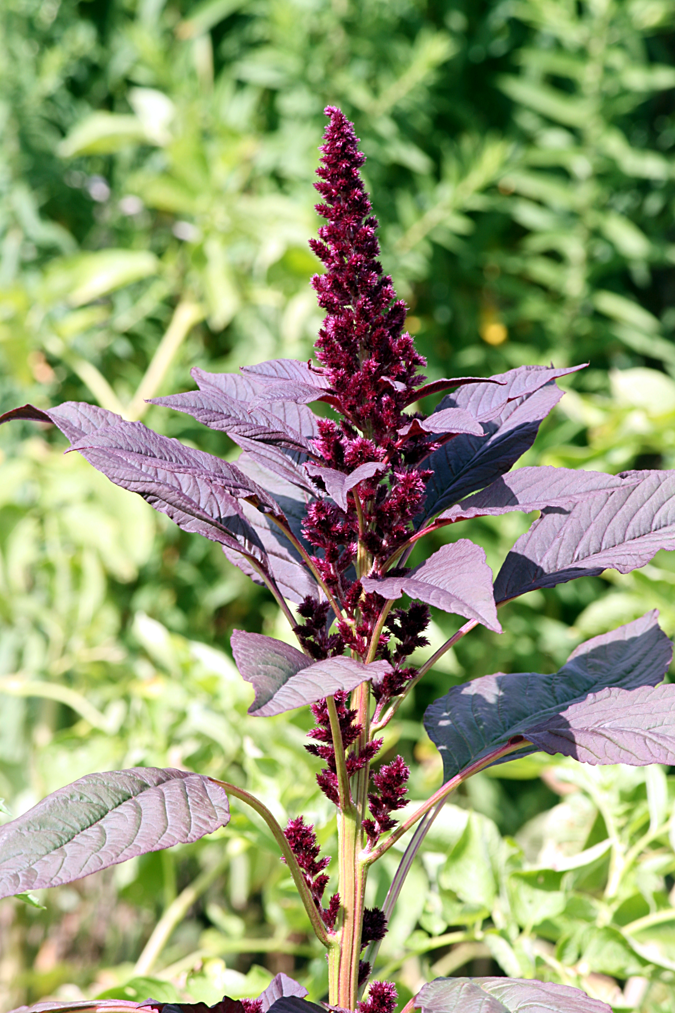 Fuchsschwanz (Amaranthus)_Amaranthaceae